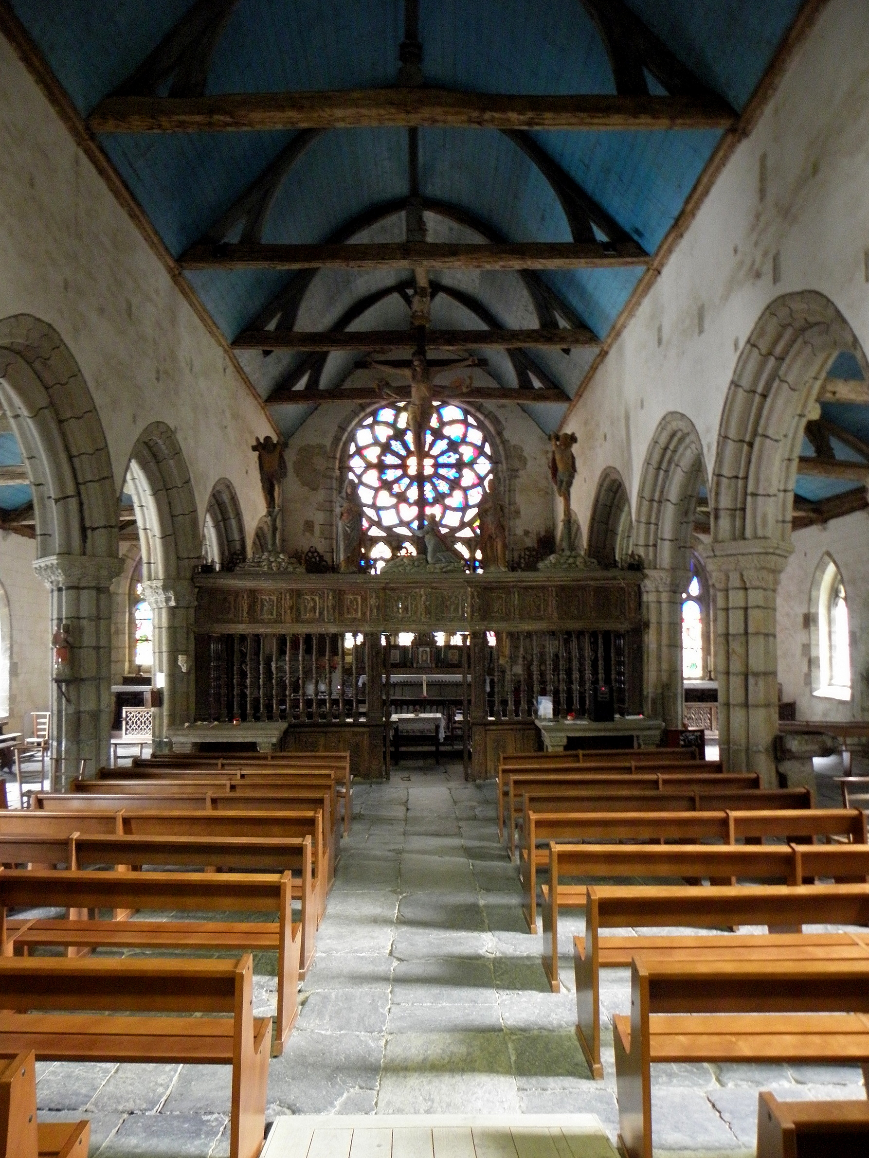 Intérieur de la chapelle Saint-Herbot en Plonévez-du-Faou (29).